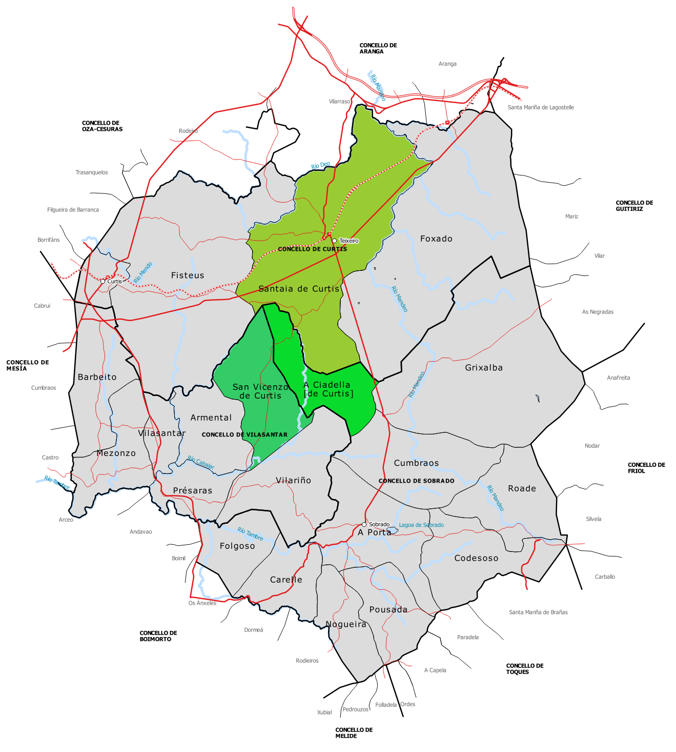 As tres parroquias de Curtis: Santaia de Curtis, A Ciadella (antiga Ciadella de Curtis) e San Vicenzo de Curtis.